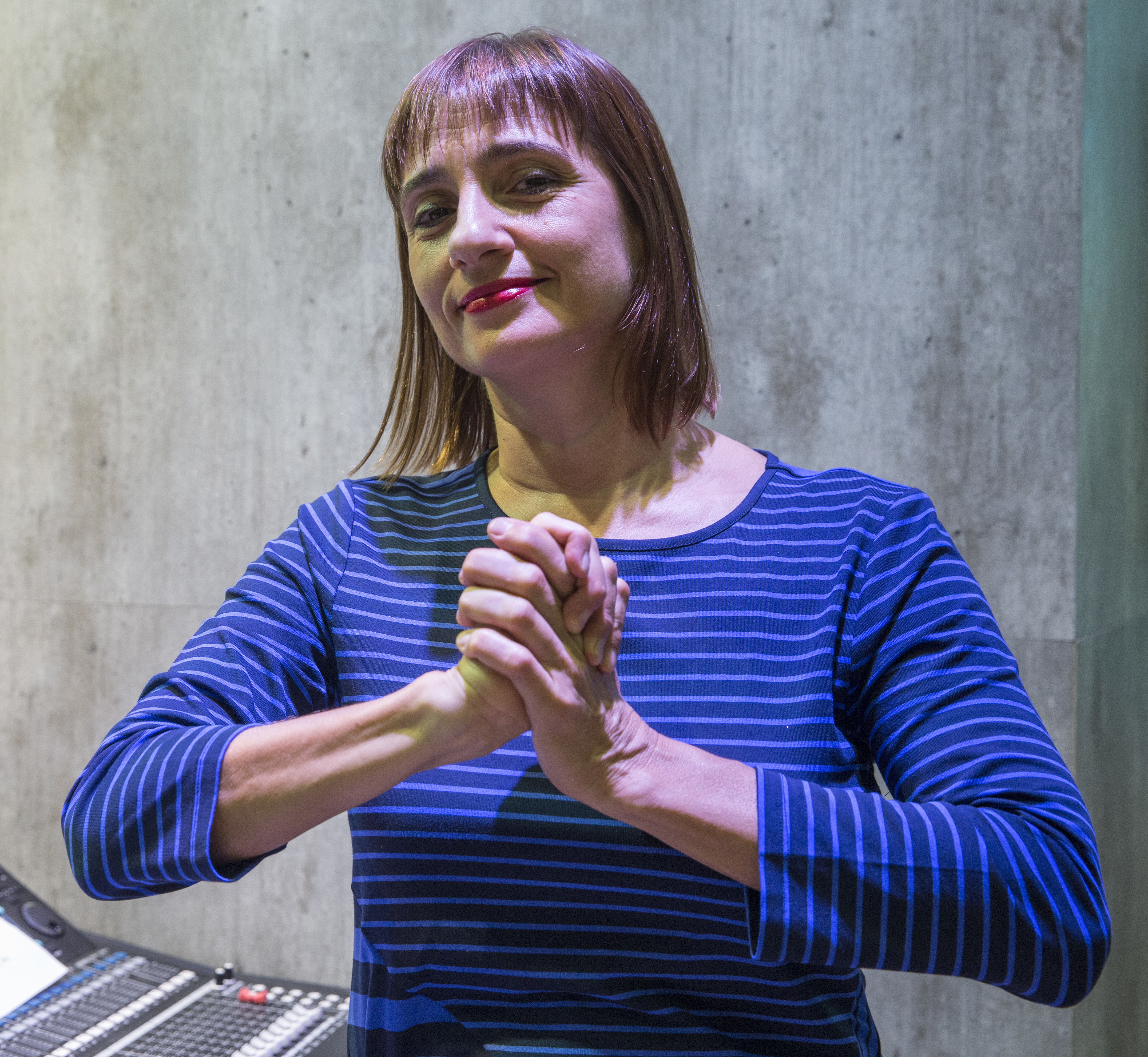 Buenos Aires, 01 de Mayo de 2017 La cantante argentina Hilda Lizarazu se presentó en el Stand de la Feria del Libro, bajo el programa “Cantautoras Argentinas”. Cientos de visitantes de la Feria se acercaron a escuchar a Lizarazu. Fotos: Silvina Frydlewsky /Ministerio de Cultura de la Nación